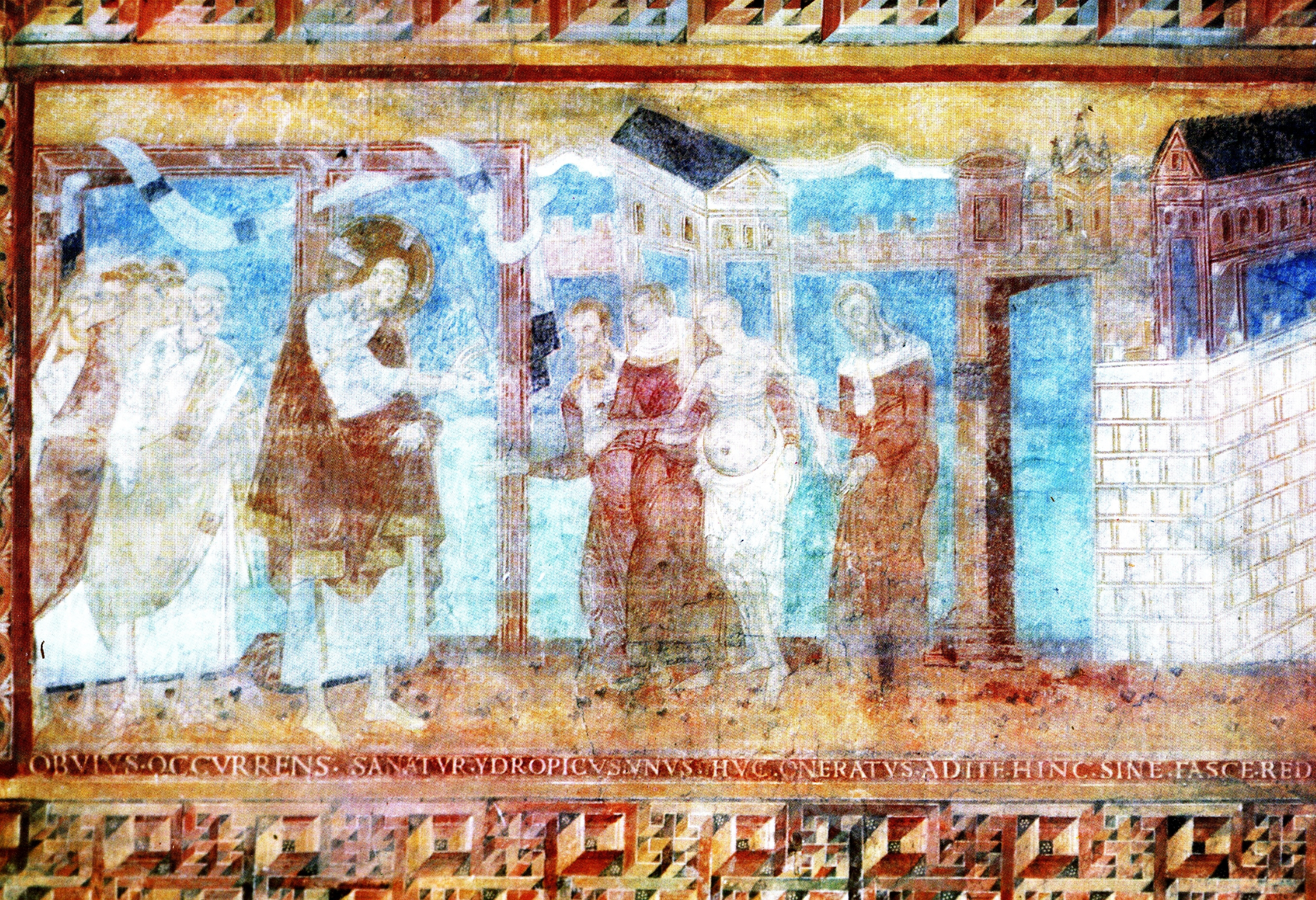 Reichenau-Oberzell, Fresko: Die Heilung des Wassersüchtigen